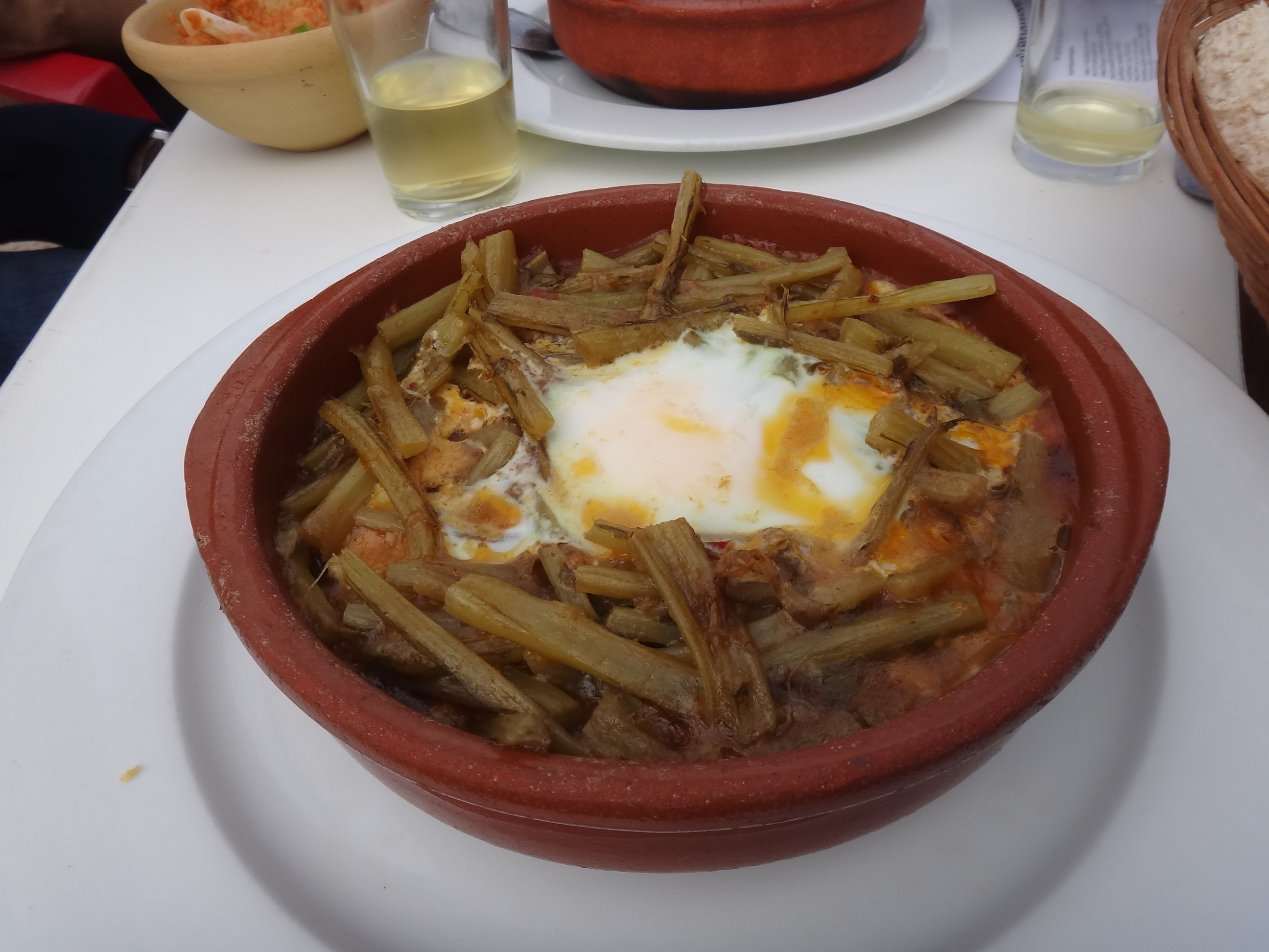 Huevo cuajado sobre Tagarninas